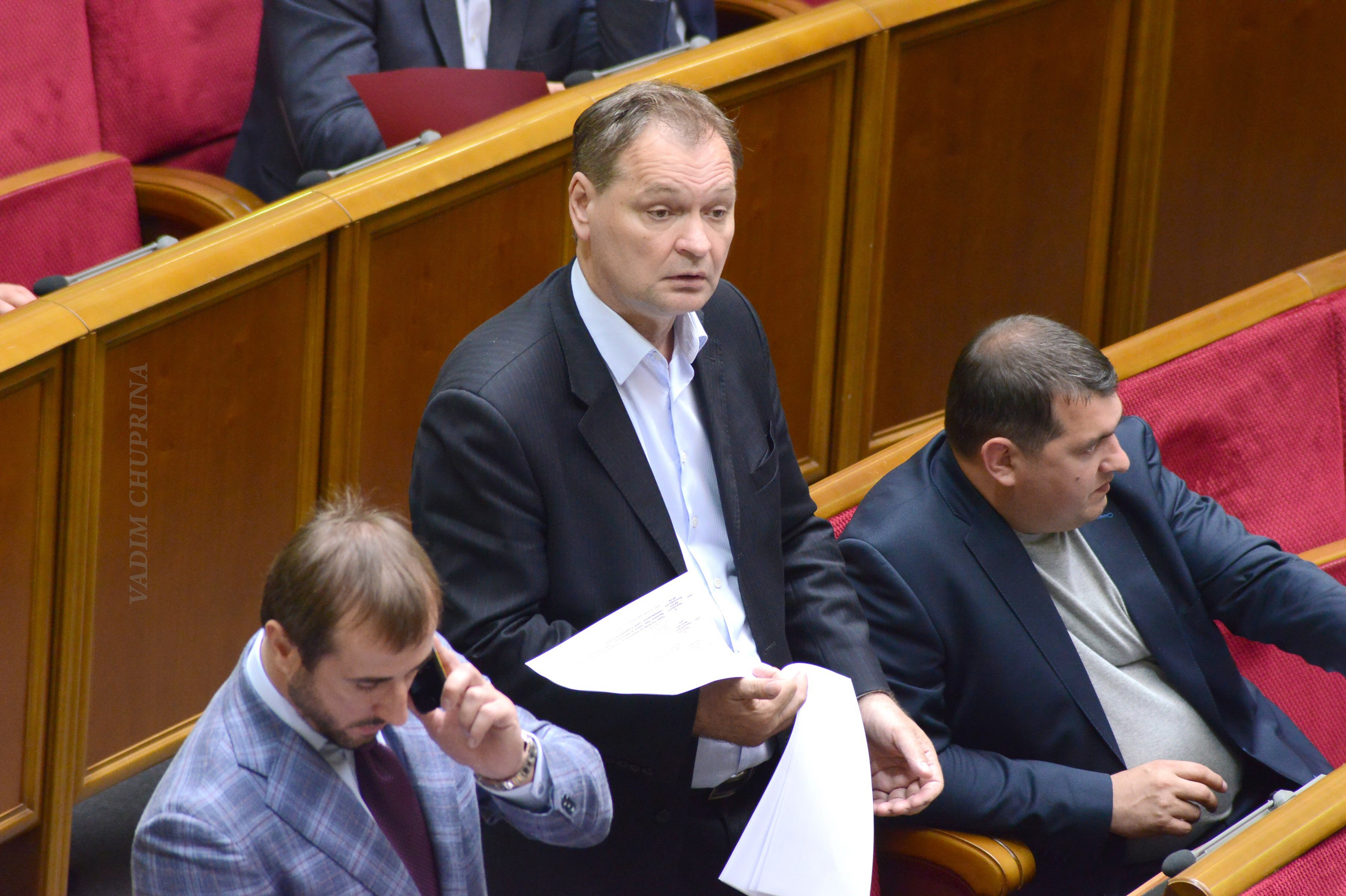 ВЕРХОВНАЯ РАДА УКРАИНЫ 2015 , фото Вадим Чуприна